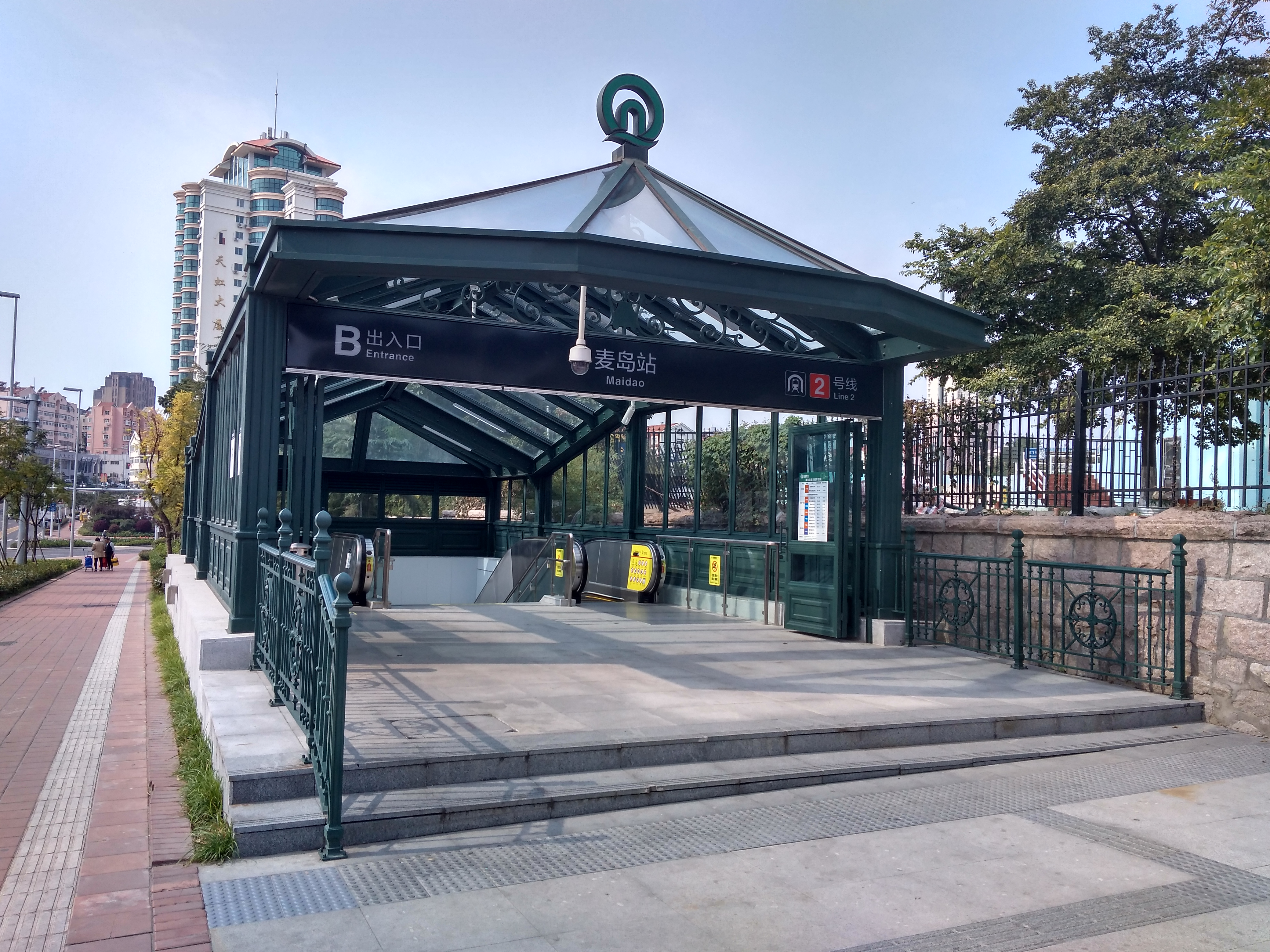 麦岛站B口